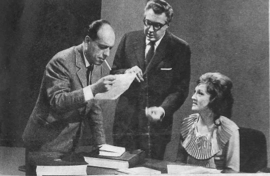 Da sinistra, gli scrittori Ottiero Ottieri e Luigi Silori con l'attrice Edmonda Aldini, Roma 1963.